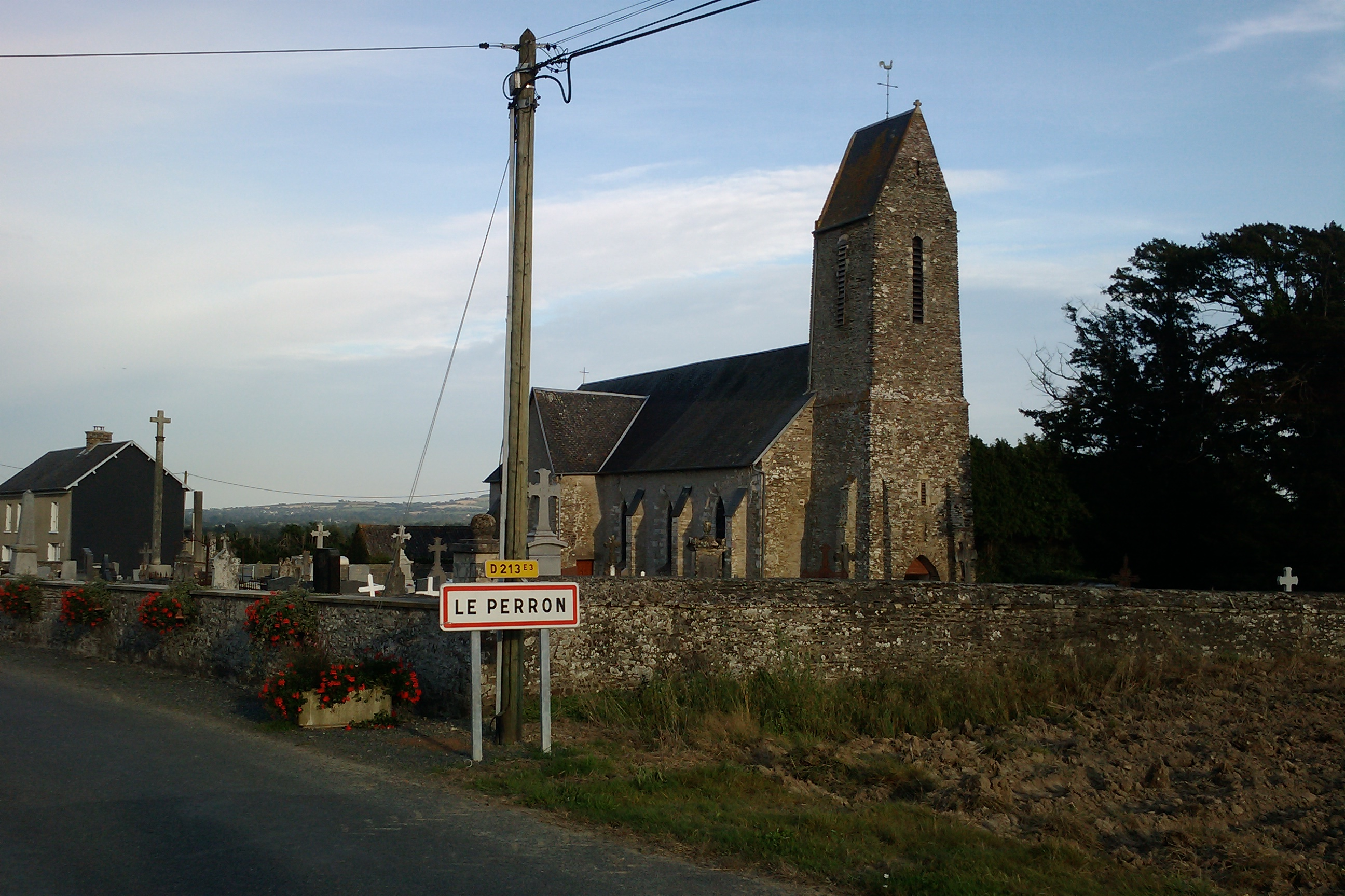 Le Perron et son église